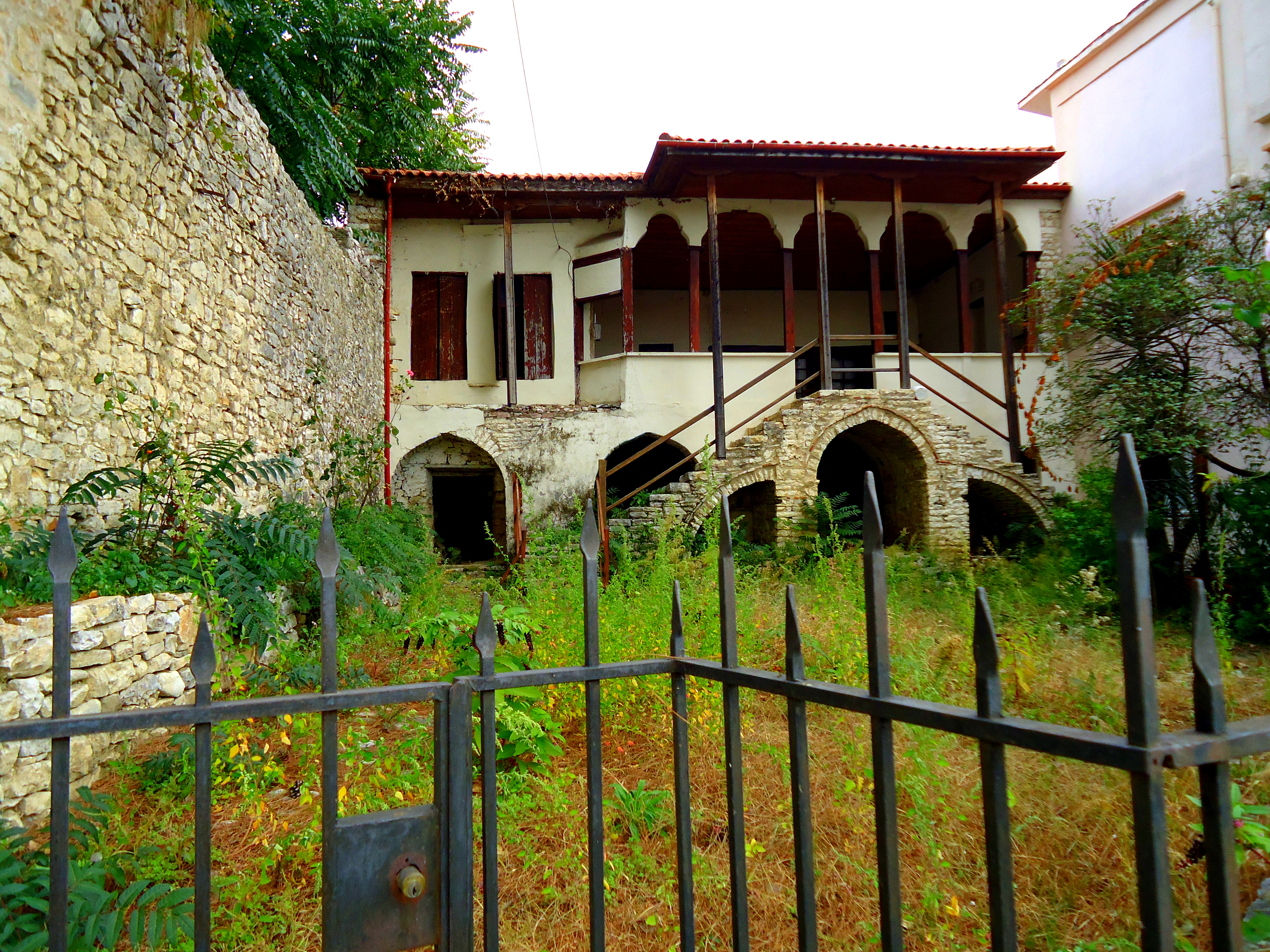 Το αρχοντικό Ζορμπά, δείγμα Οθωμανικής αρχιτεκτονικής στην Άρτα.